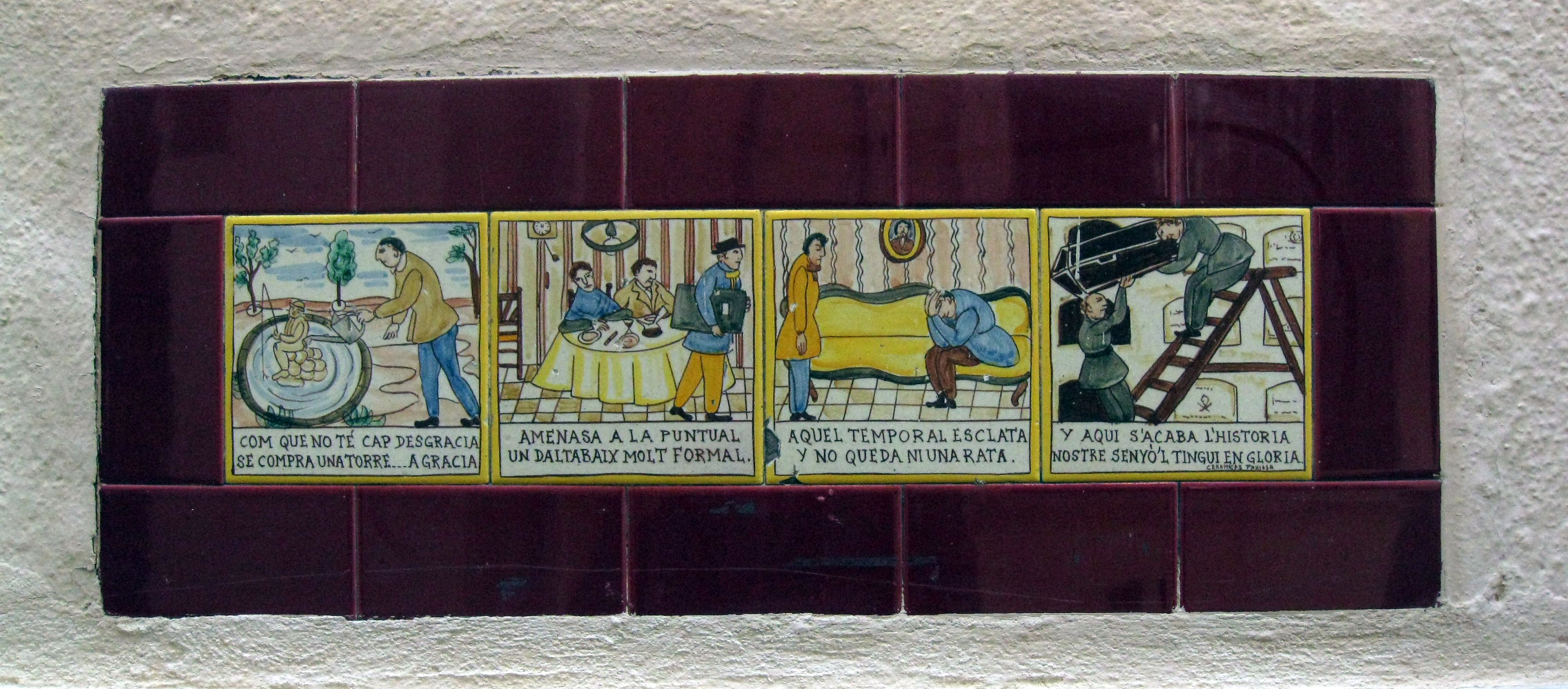 L'auca del senyor Esteve, al carrer Cremat de Terrassa. La fi del senyor Esteve. Rodolins de Gabriel Alomar i dibuixos de Ramon Casas. Va donar origen a la novel·la homònima de Santiago Rusiñol.